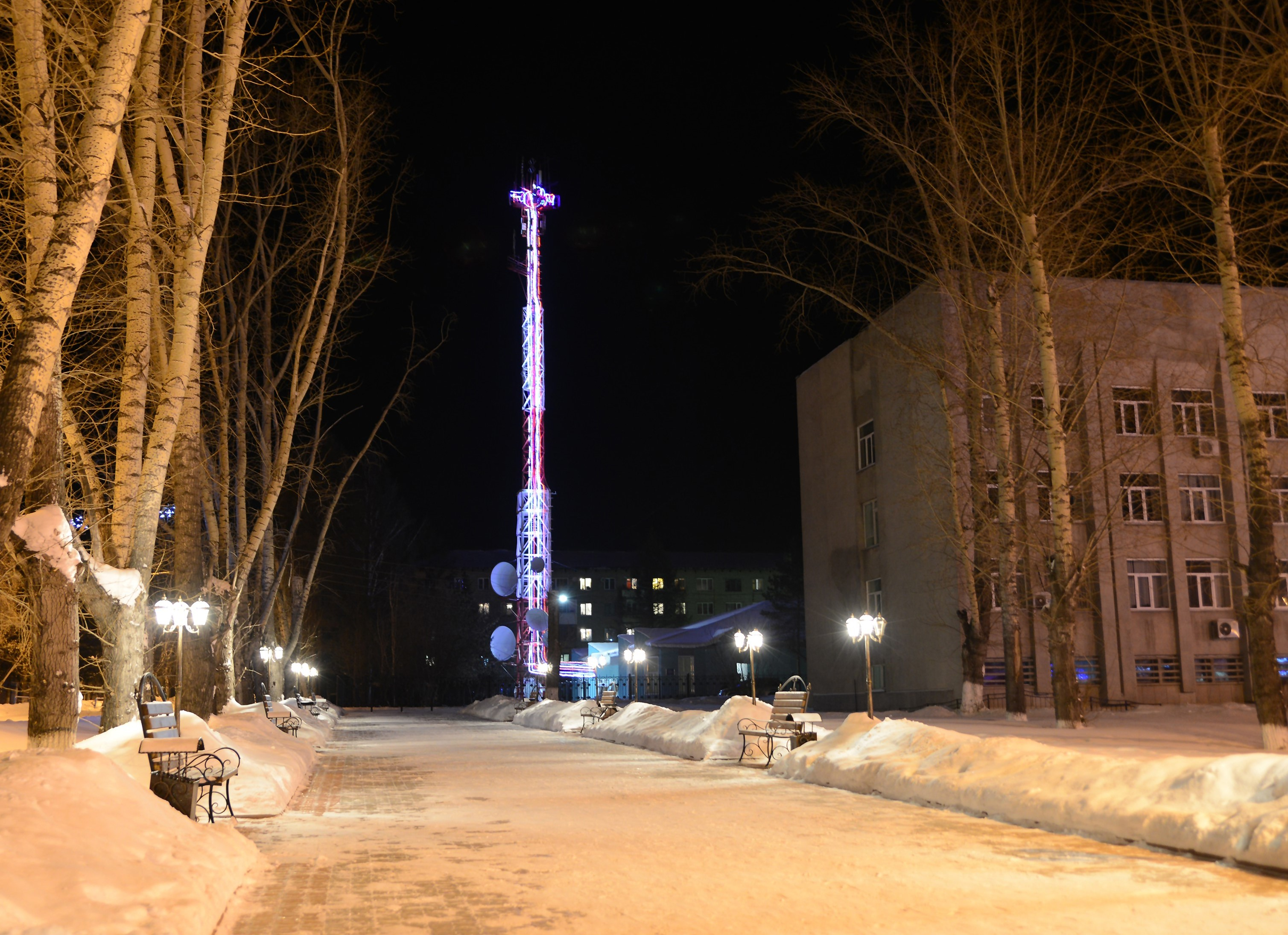 Фото радиотелевизионной станции в городе Асино Томской области